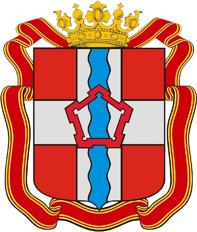 Das Wappen wurde am 28. April 2020 genehmigt